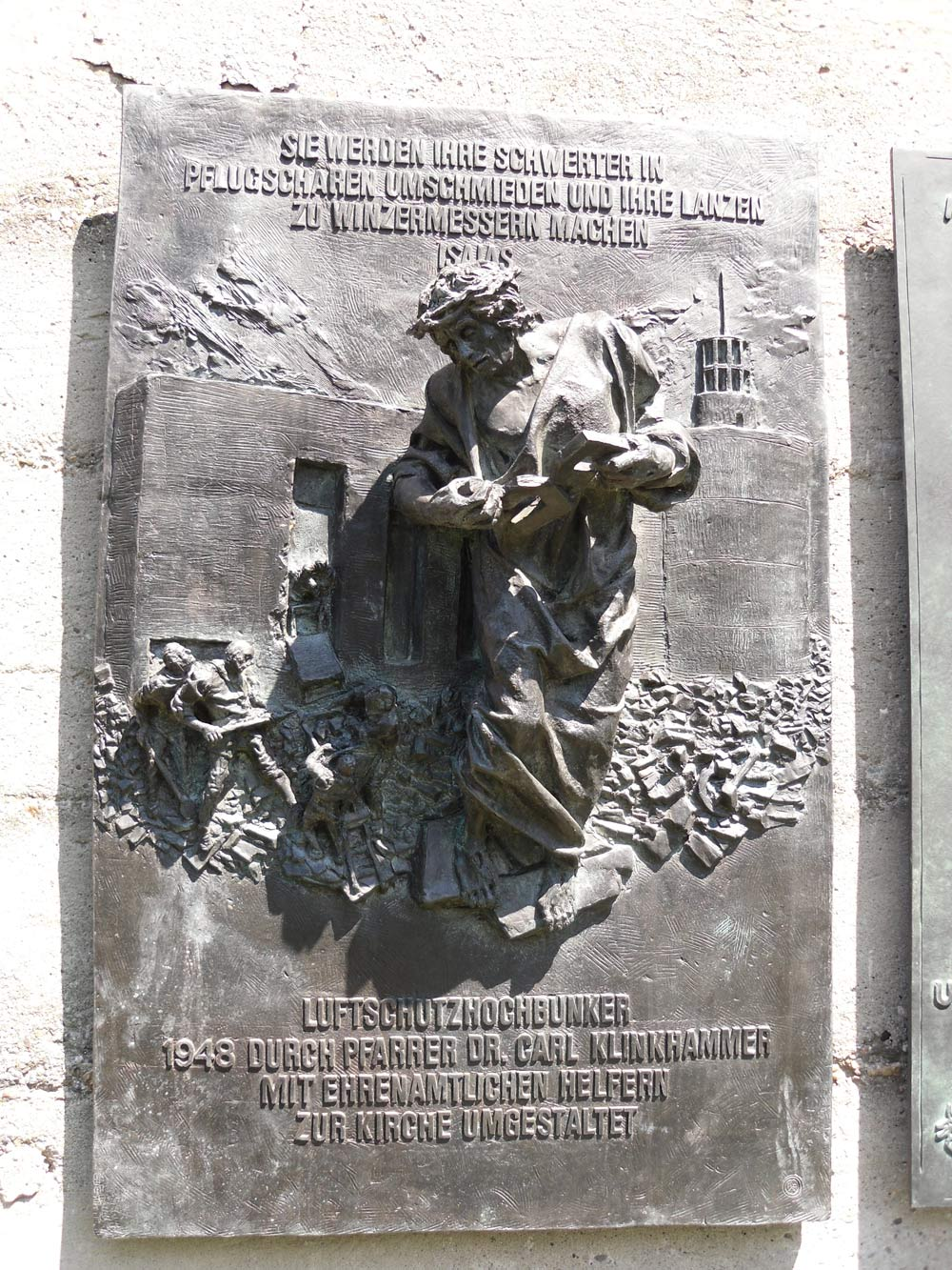 Kirche St. Sakrament, Düsseldorf-Heerdt